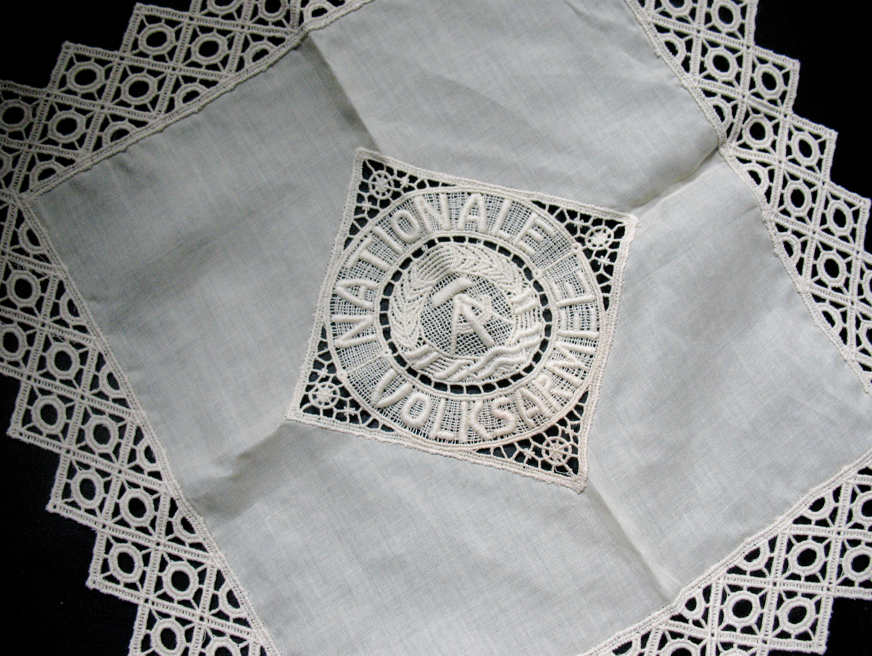 Tischdecke in Plauener Spitze, Motiv: Nationale Volksarmee der DDR